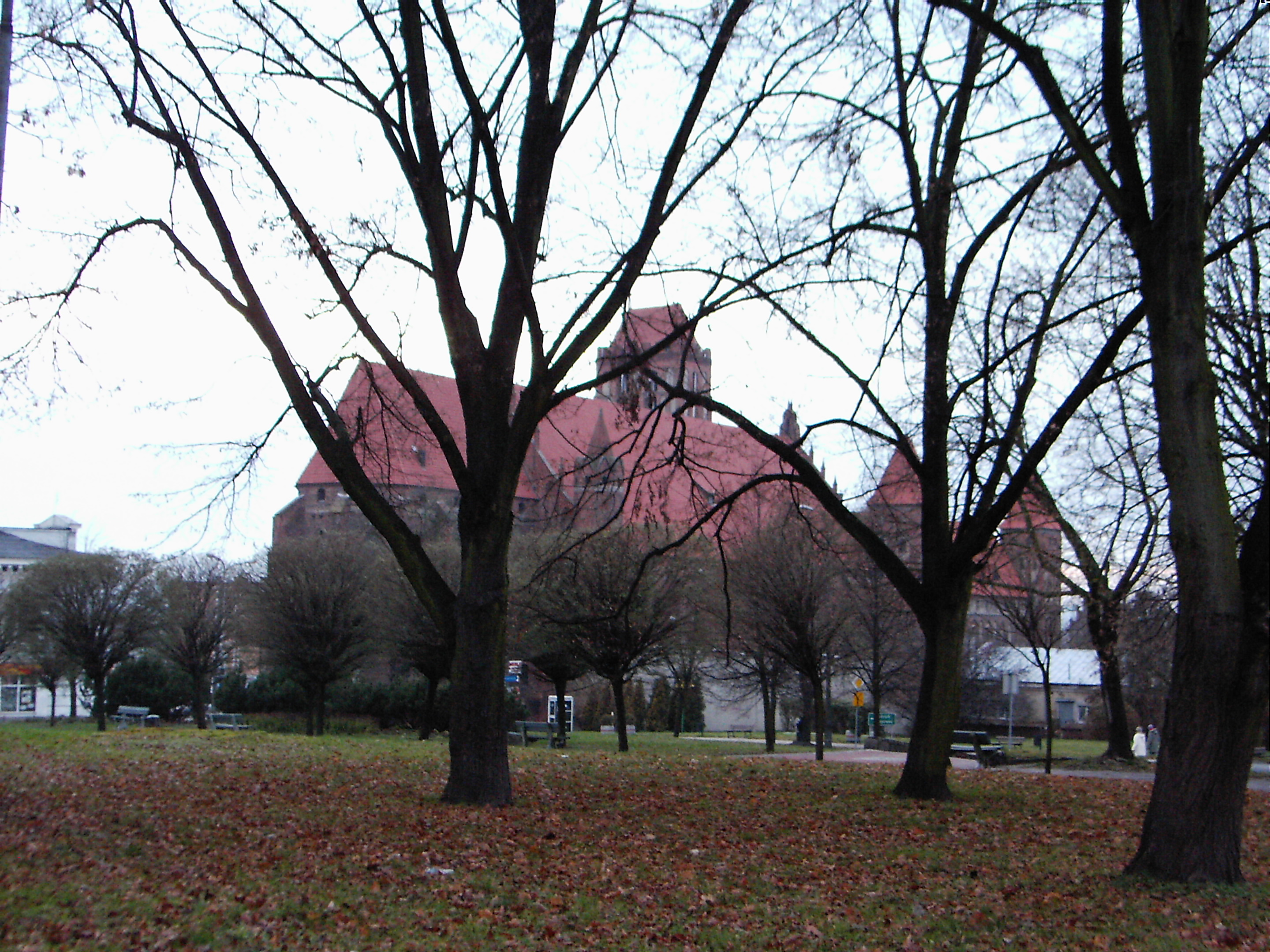 Kwidzyn. Kompleks katedralno-zamkowy.